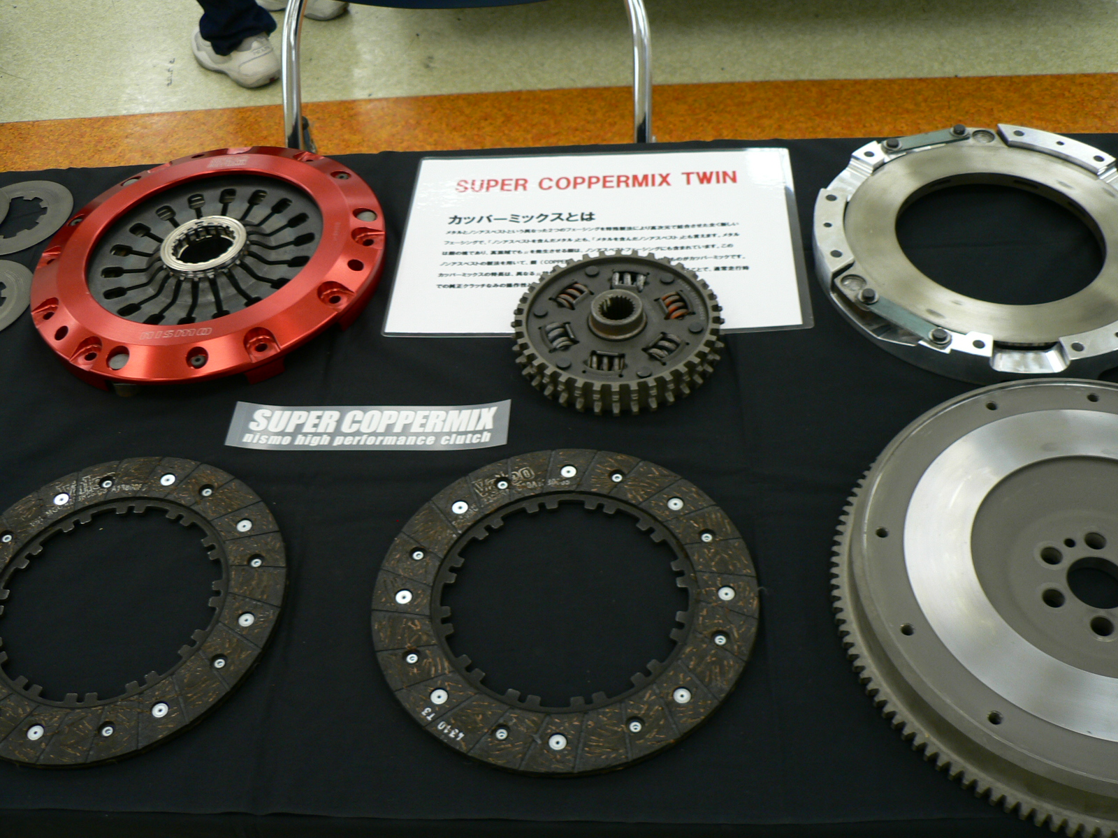 クラッチNISMO SUPER COPPER MIX TWIN。 TUNING POWERS! 2007で撮影。